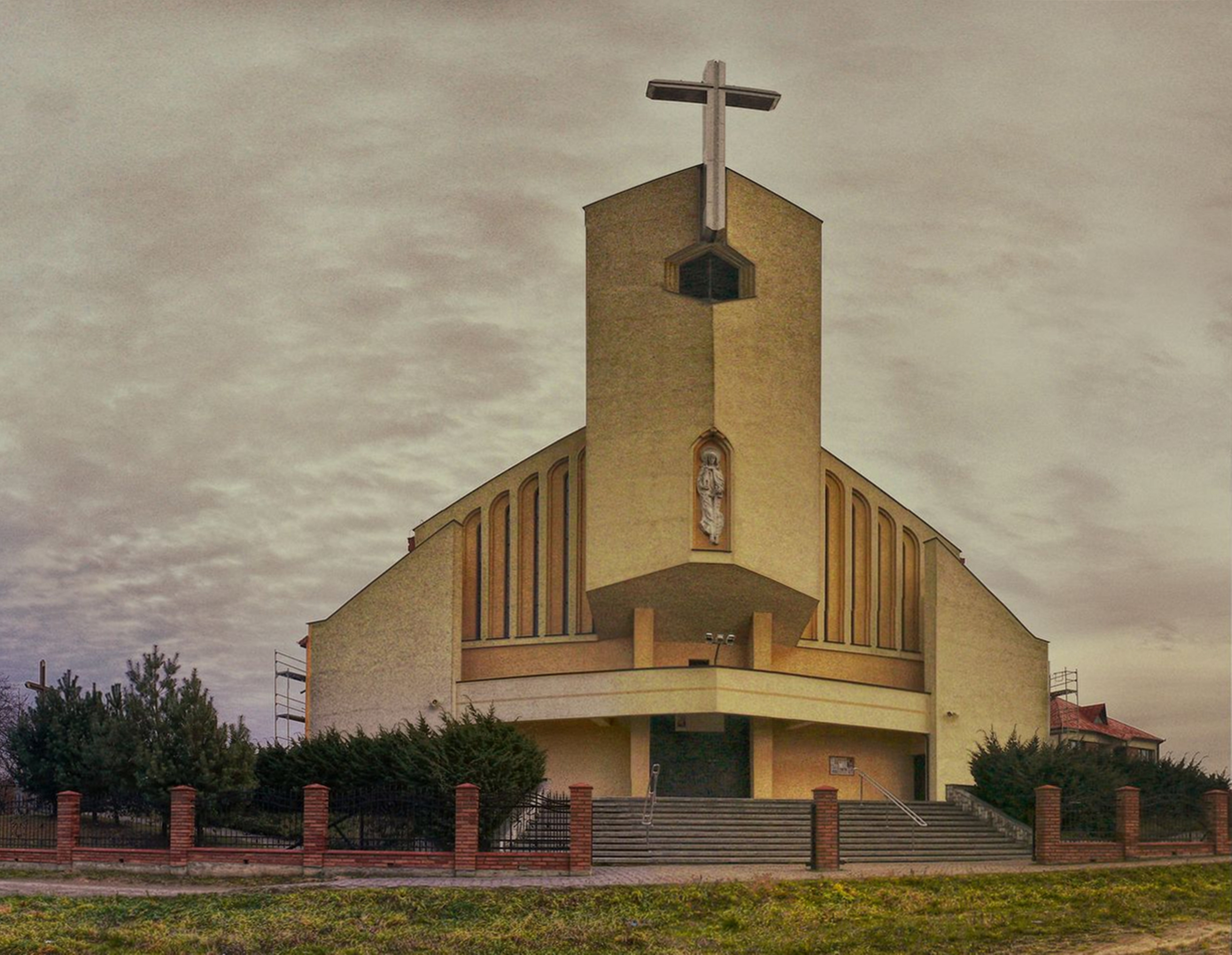 Kościół p.w. Św. Barbary w Łęcznej, woj. lubelskie. Fotografia przetworzona w technice hdr.